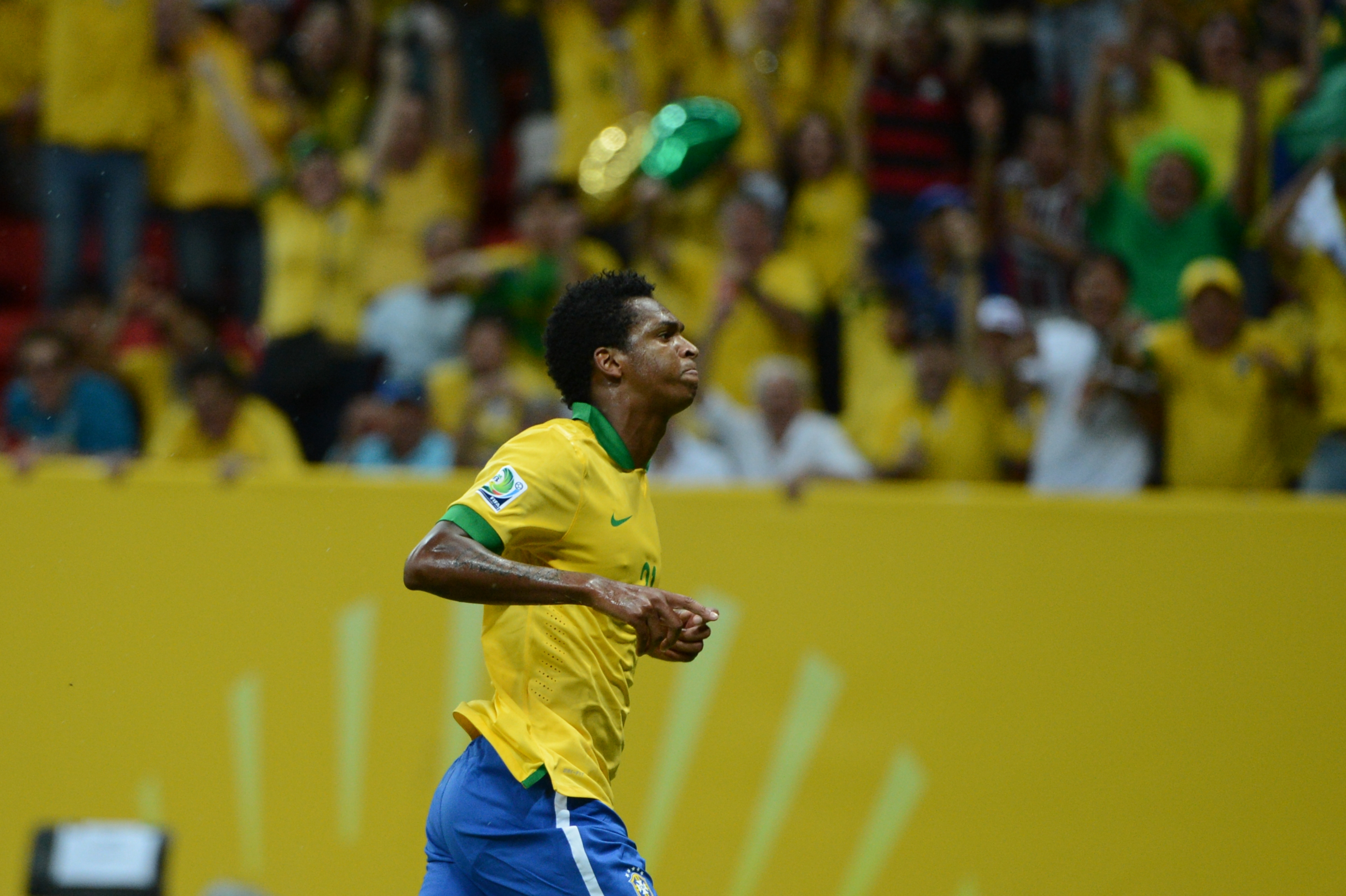 Jogo entre Brasil e Japão abre a Copa das Confederações